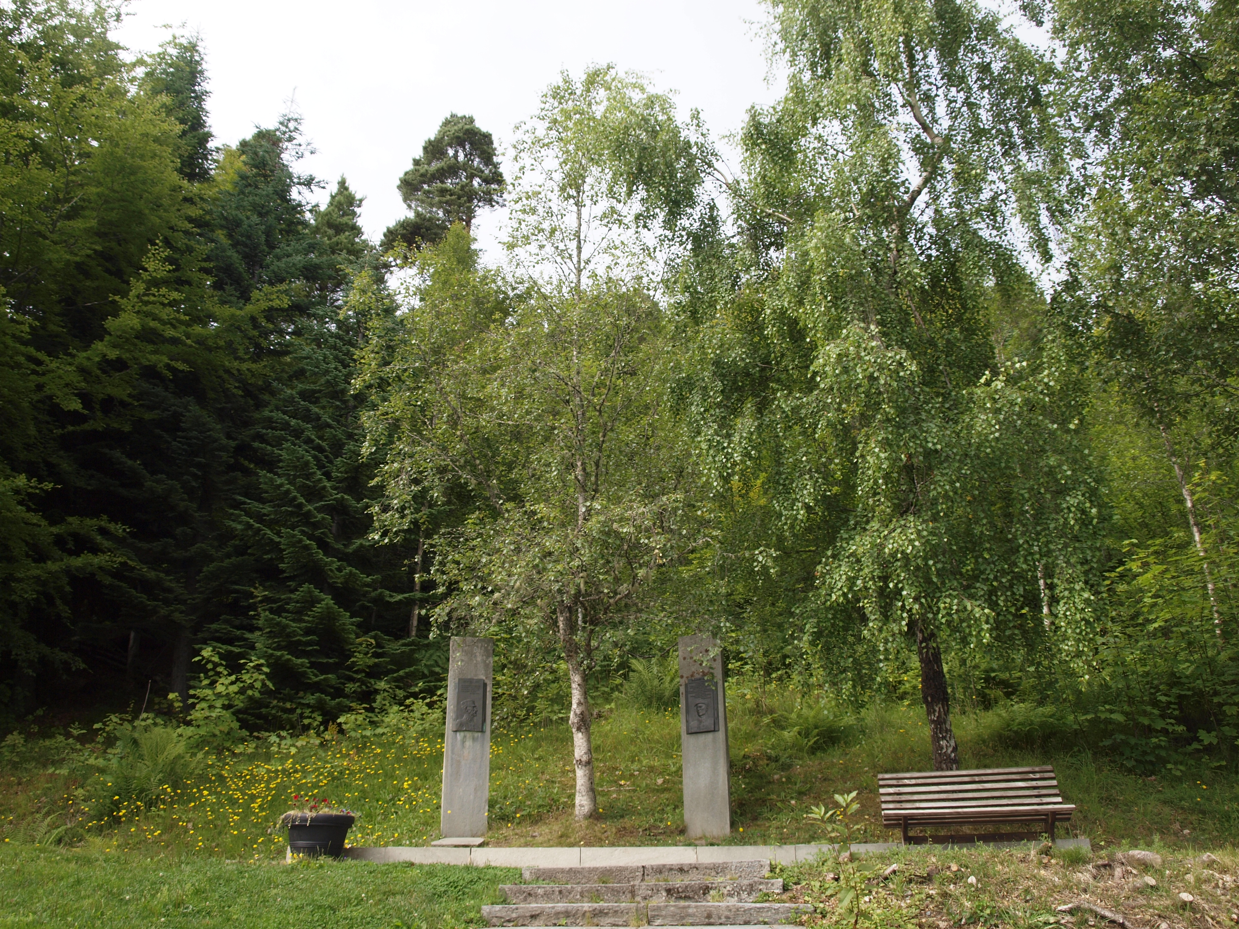 Art in Molde, Norway